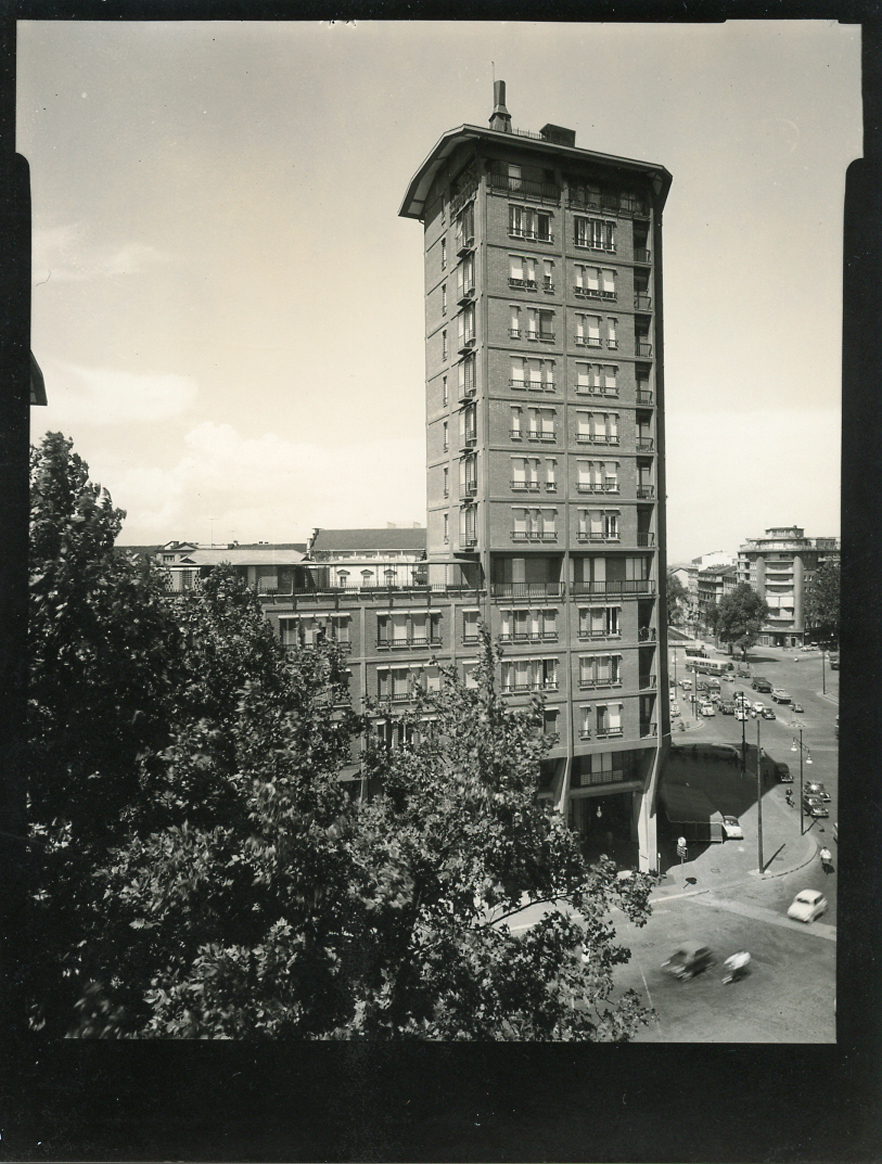 Torino, la cosiddetta "Torre BBPR" in piazza Statuto angolo corso Francia. Servizio fotografico : Torino, 1970 / Paolo Monti. - Fototipi: 11 : Positivo b/n, gelatina bromuro d'argento/ carta, provino a contatto da pellicola 10x12. - ((Al verso dei provini numero di negativo corrispondente: 1067, 1068, 1072, 1076, 1078, 1082, 1084, 1106, 1110, 1117, 1119. La suddetta serie è contenuta nella scatola identificata con la numerazione 174. Sul coperchio manoscritto a pennarello: "Provini". - Fonte: Rubrica di Paolo Monti: Archivio 10x12 (ultimi numerati) - dal G1 al (s.d.), presso Archivio Paolo Monti